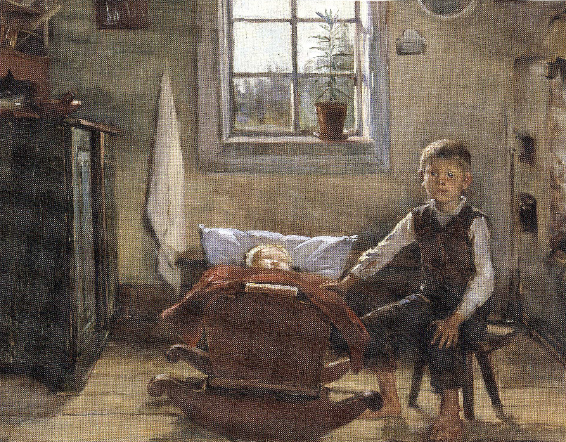 Helena Westermarckin maalaus Lapsia tuvassa. Yksityiskokoelmassa.